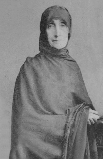 Juana Manuela Gorriti novelista salteña la primera de Sudamerica. Inventario Fografico nº 126389. del Archivo General de la Nacion Argentina.